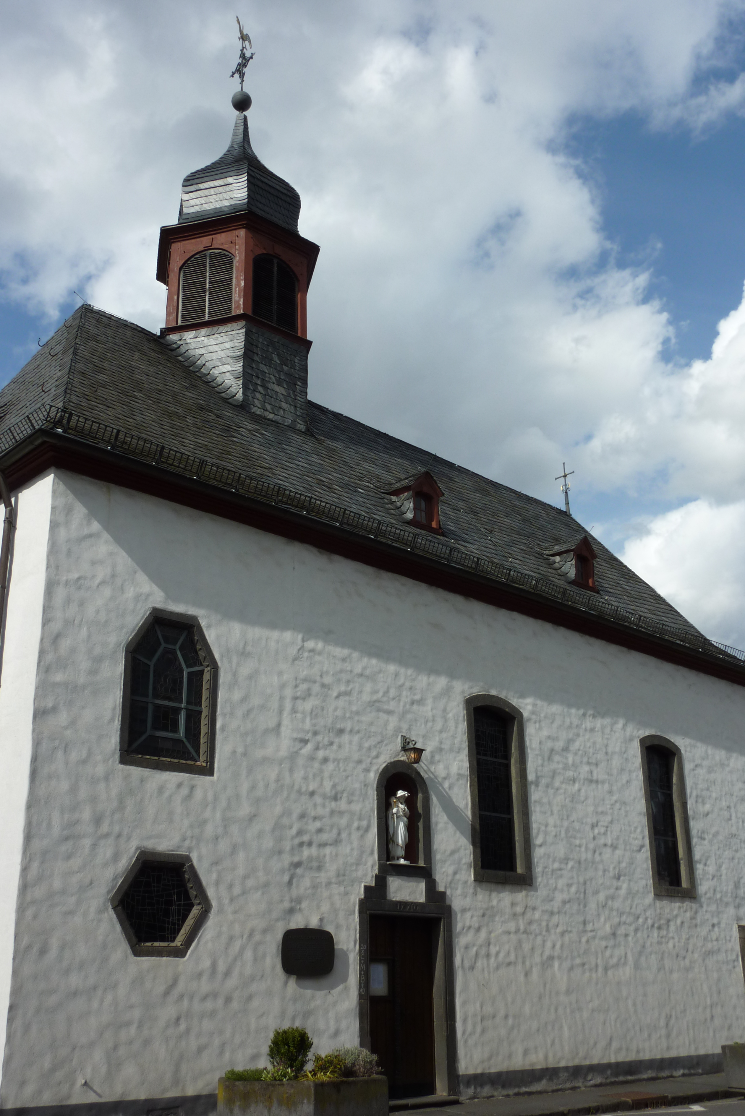 Kapelle St. Josef in Walporzheim, Stadtteil von Bad Neuenahr-Ahrweiler